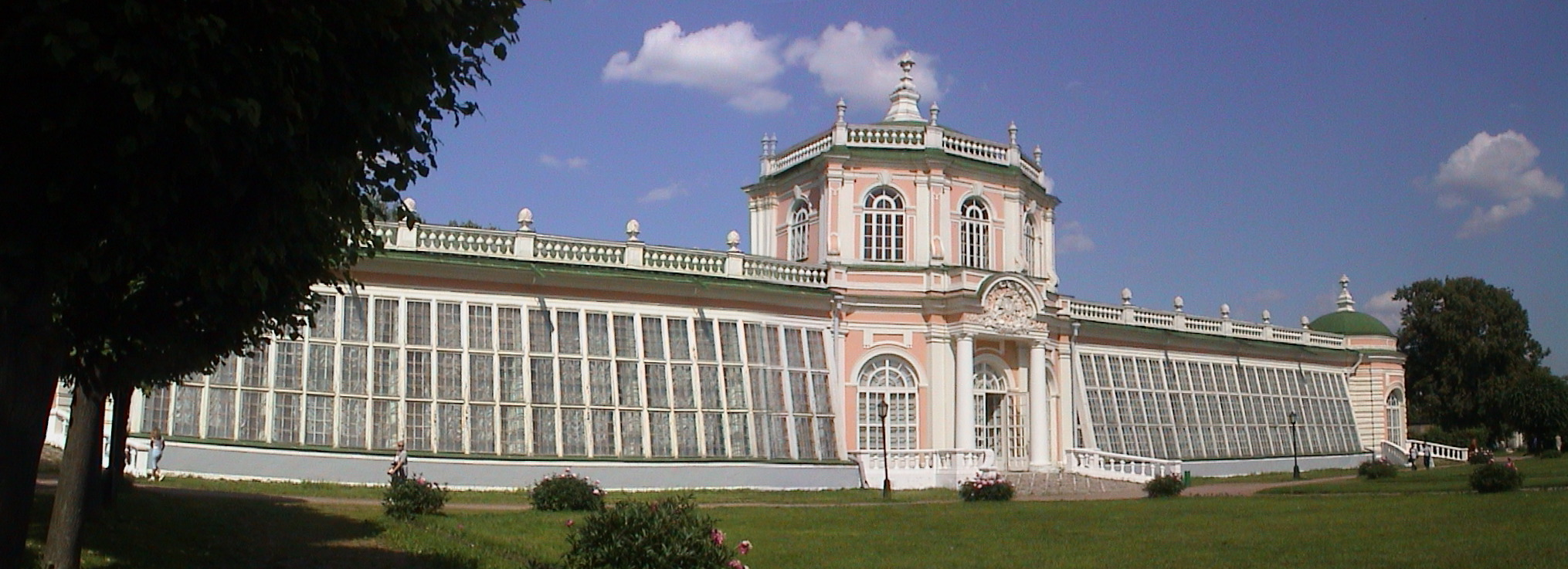 Кусково (Москва) Вид Большой каменной оранжереи с залом для концертов и танцев